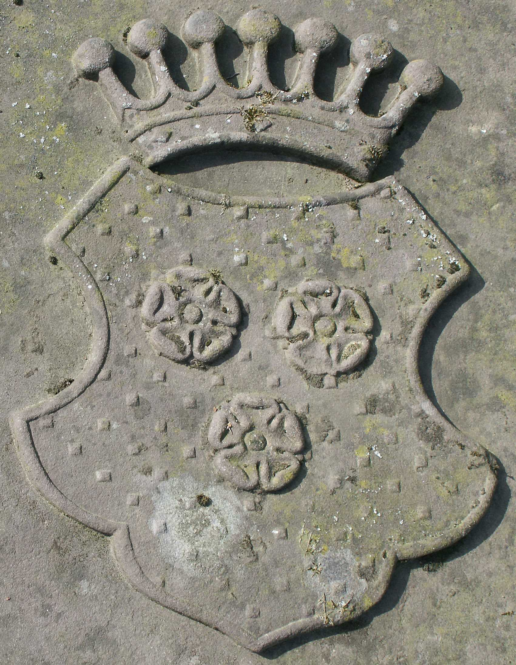 Wappen der Familie von Trümbach auf dem Grabstein von Friedrich Wilhelm Siegmund Freiherr von Trümbach auf Wehrda (*22. Februar 1833, † 9. Juli 1883), auf dem Friedhof in der Nähe der Ruine Altwehrda